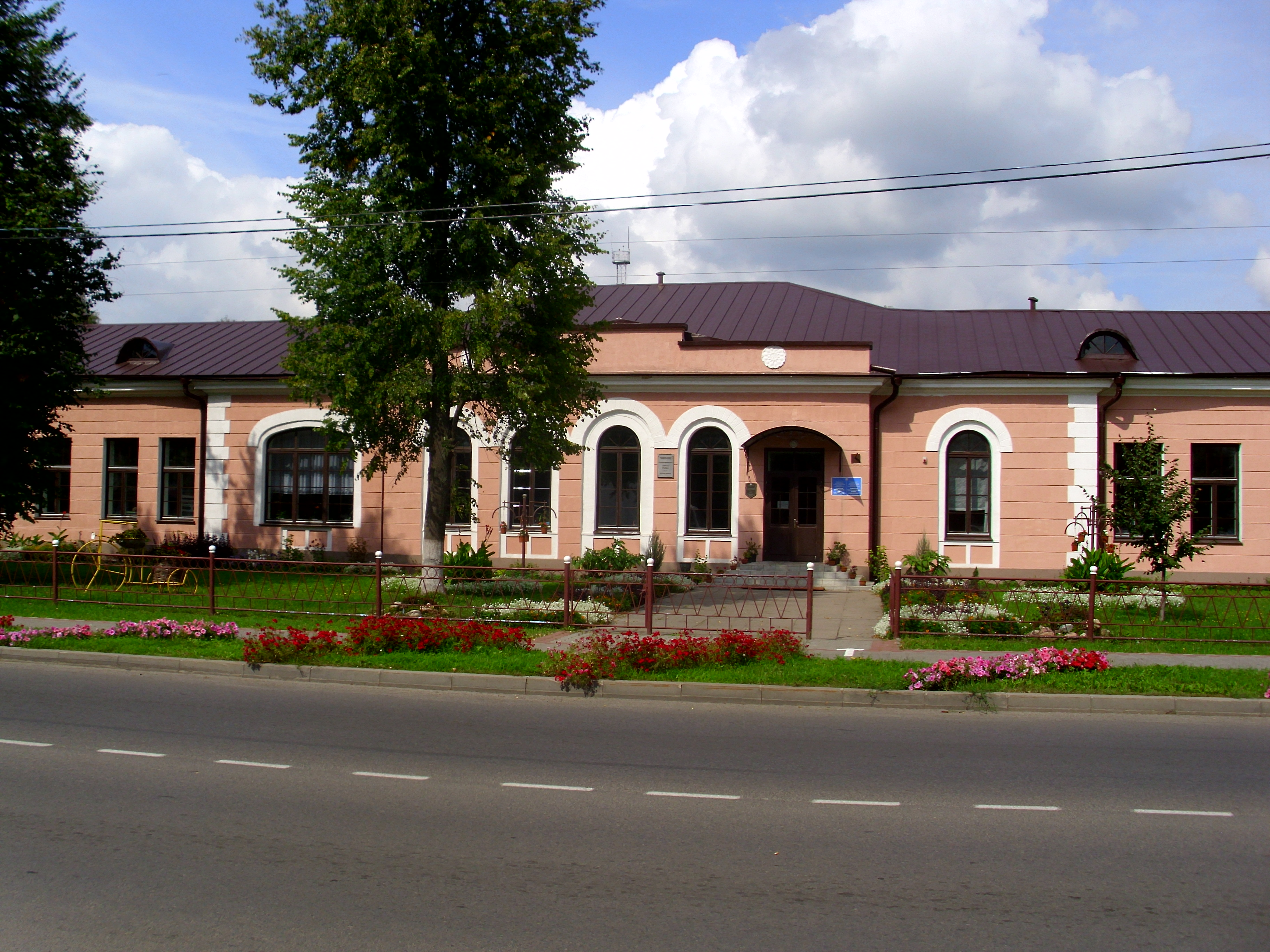 Ул. Советская, 108. Здание бывшей почтовой станции в городе Кобрин, Брестская область, Беларусь. This is a photo of Belarusian heritage monument. Reference number: 113Г000400 ( WLM)